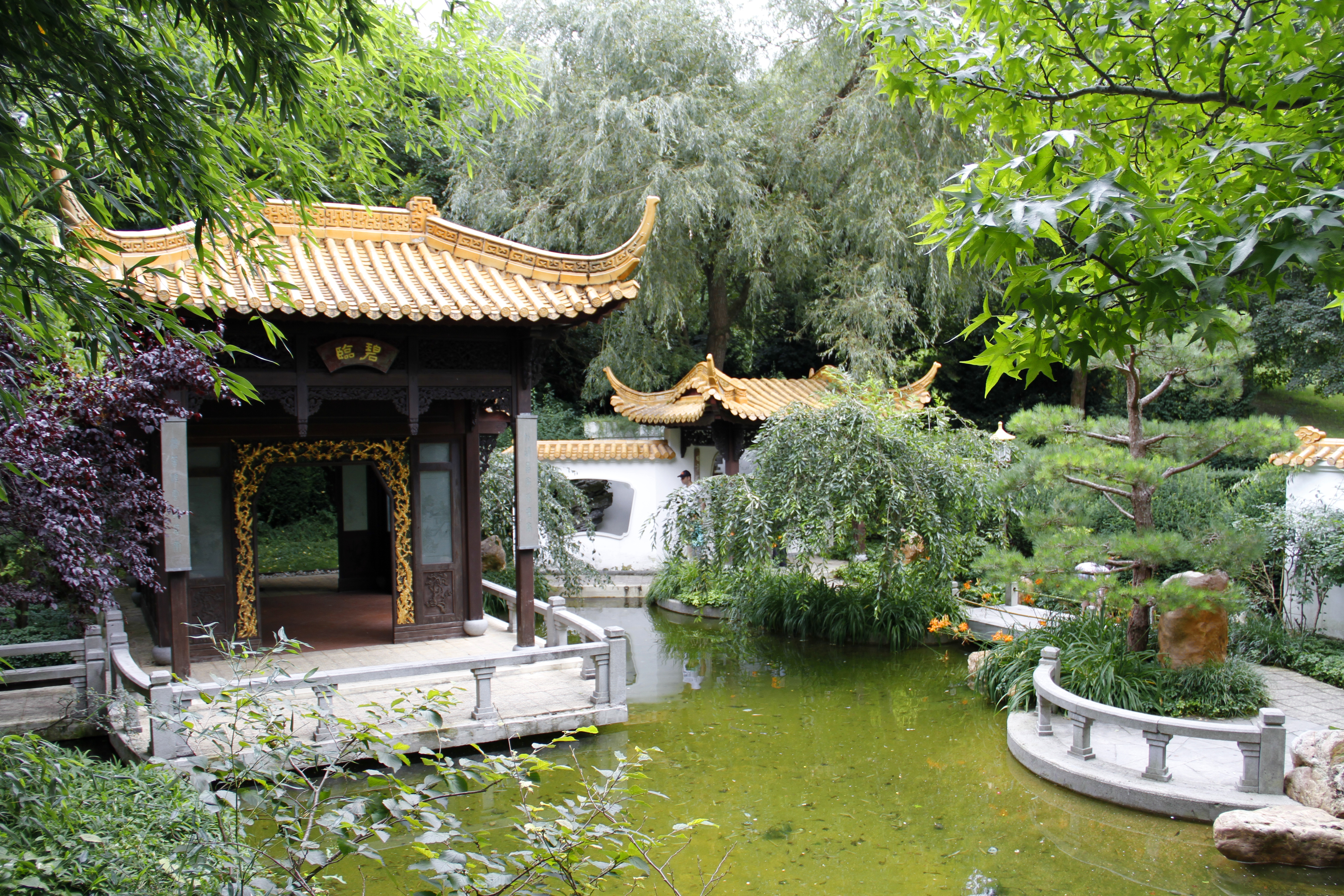 Westpark München, Chinesischer Garten